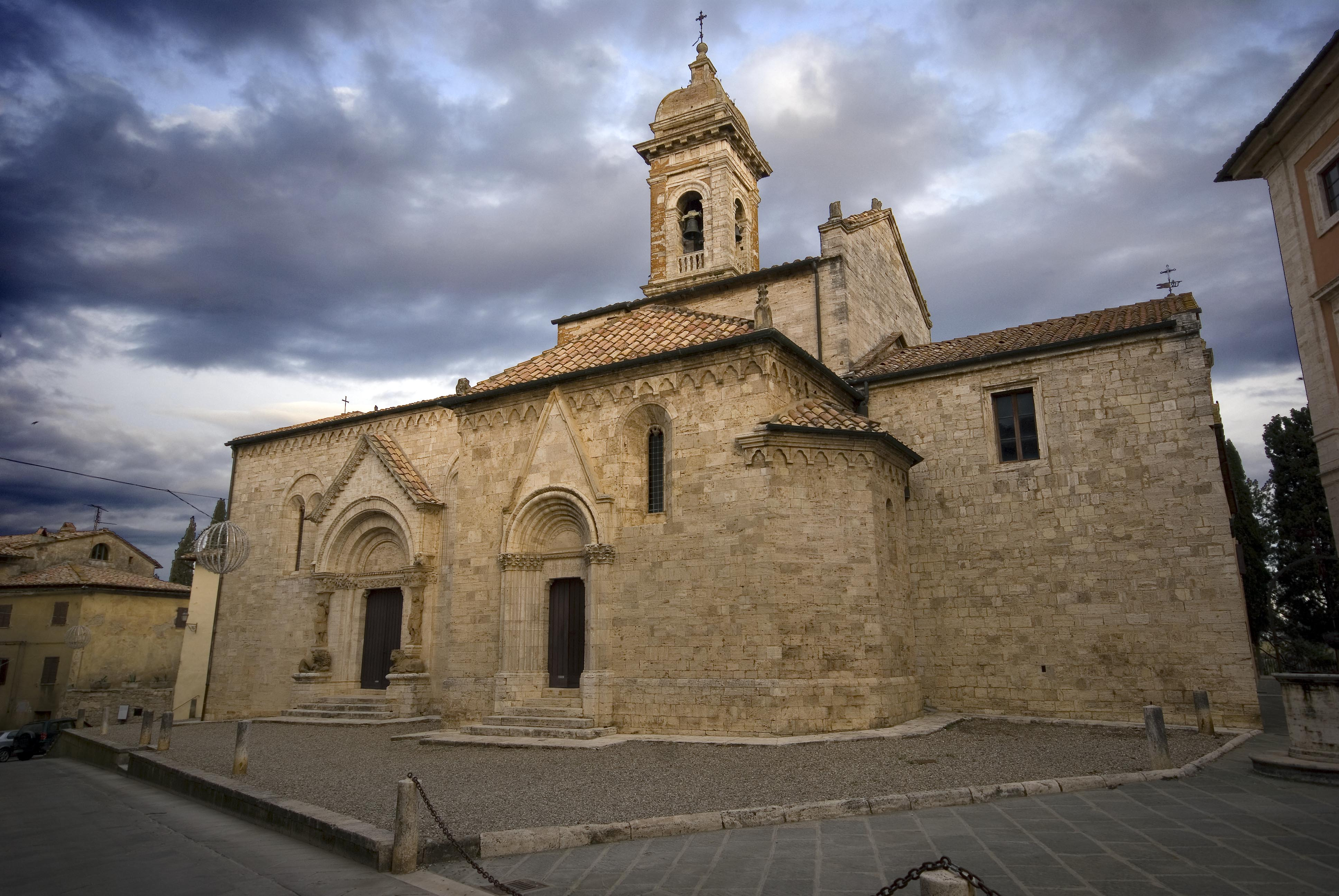 Chiesa collegiata di San Quirico d'Orcia